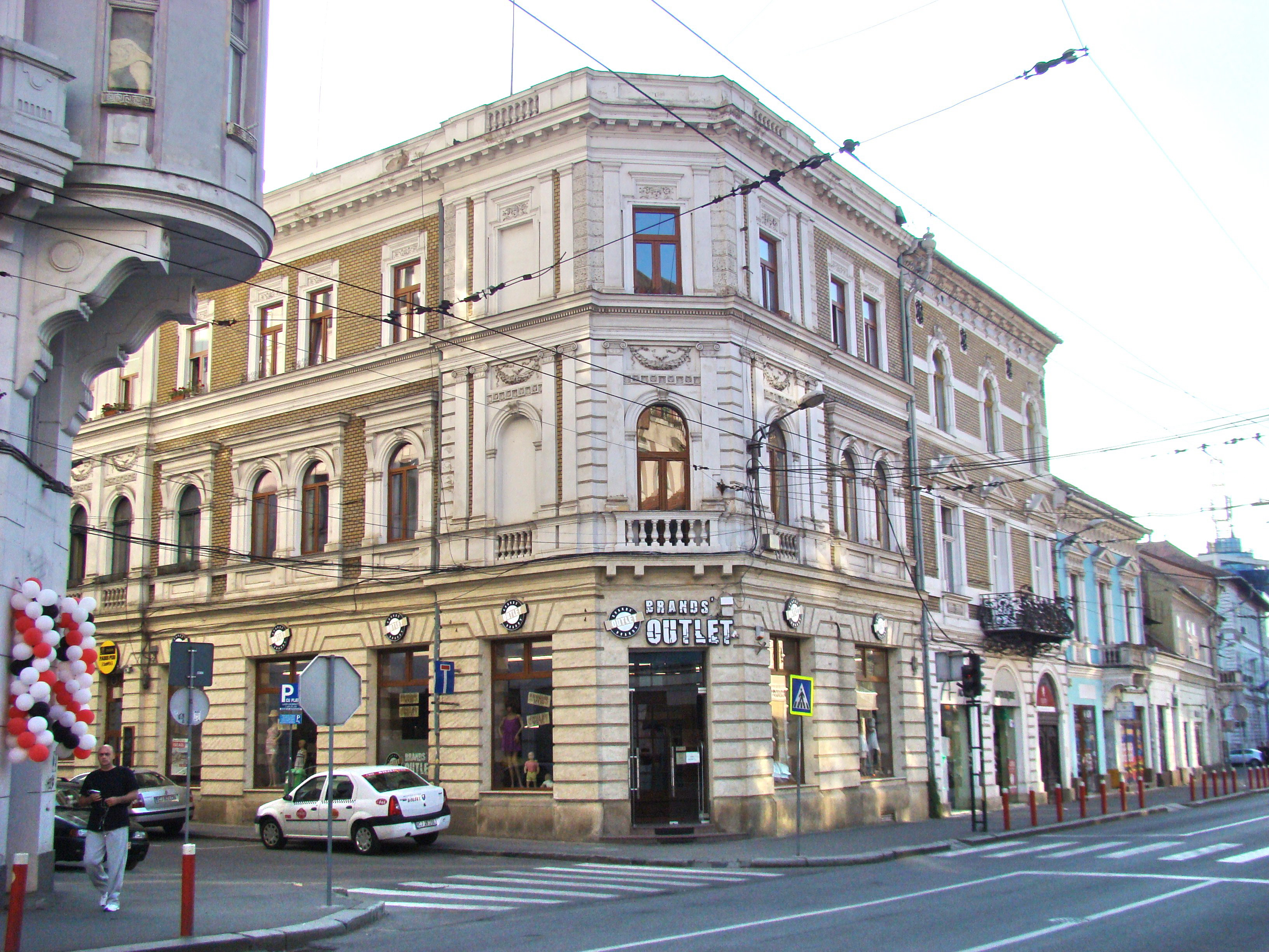 Clădirea fostului hotel Pannonia (str. Regele Ferdinand nr.17)